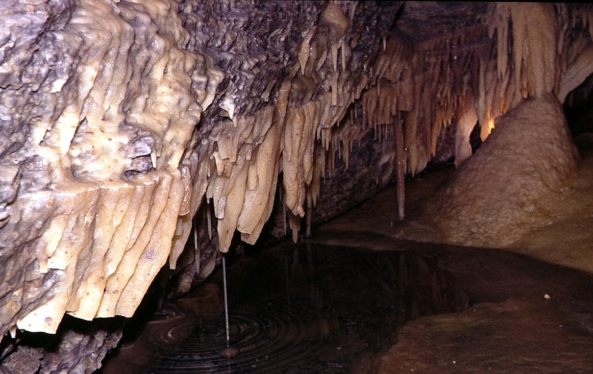 Eberstadter Tropfsteinhöhle: Höhlensee mit Rosette